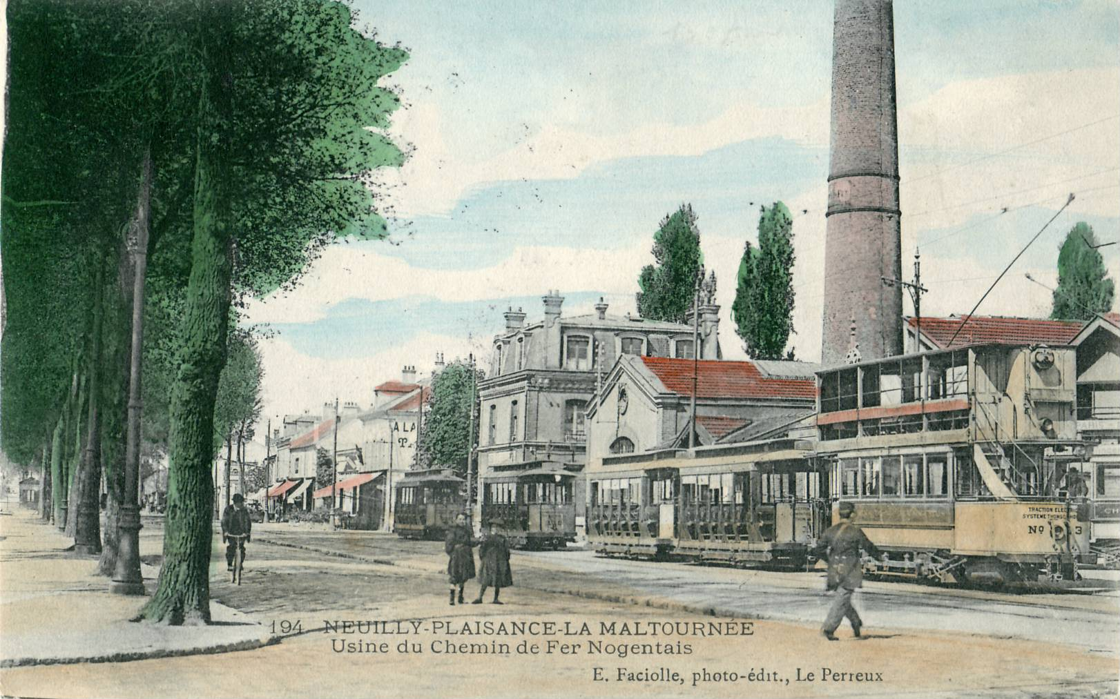 Carte postale ancienne éditée par Faciolle N° 194 NEUILLY-PLAISANCE-LA-MALTOURNEE : Usine du Chemin de fer Nogentais